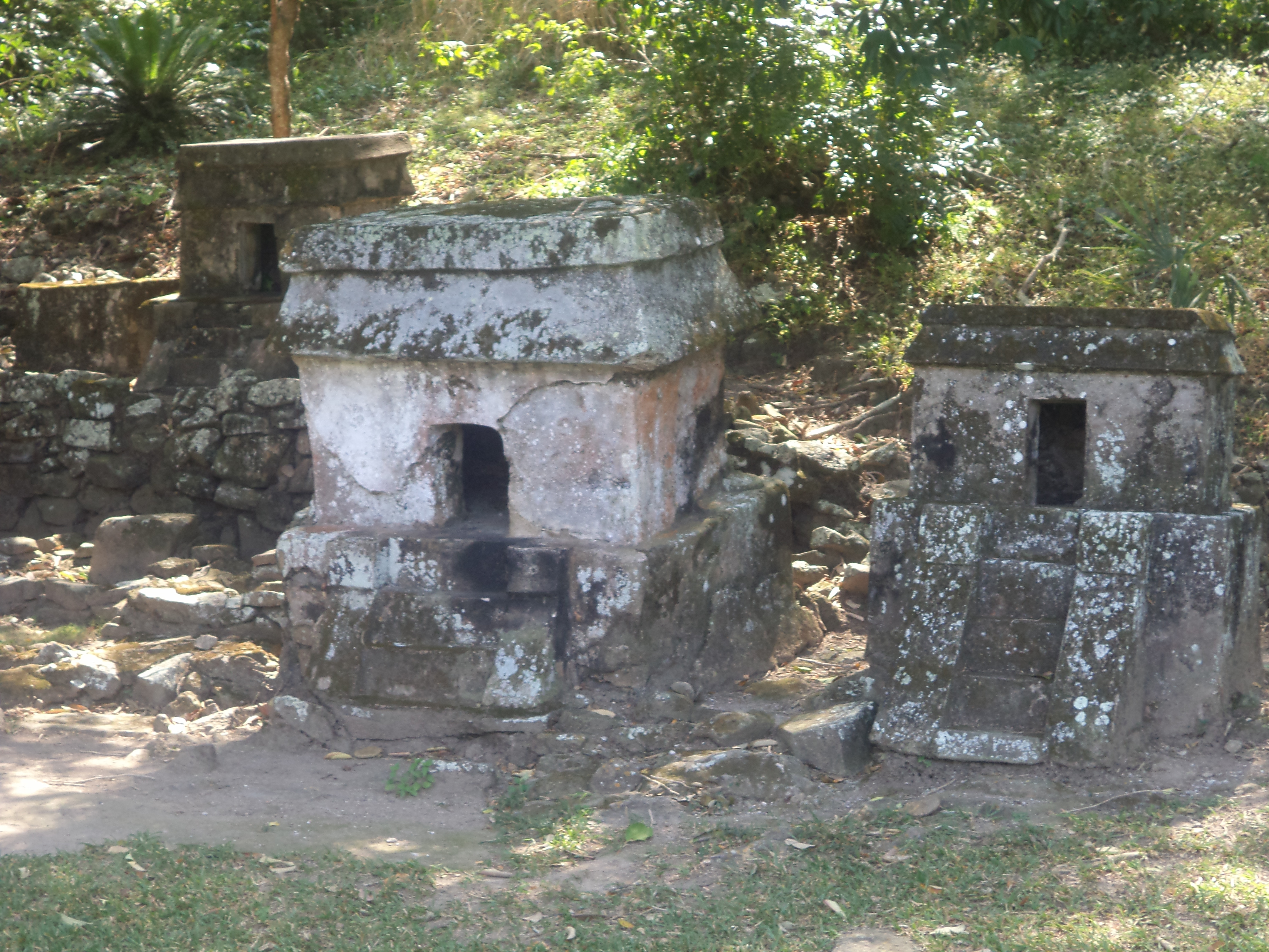 Quiahuiztlan